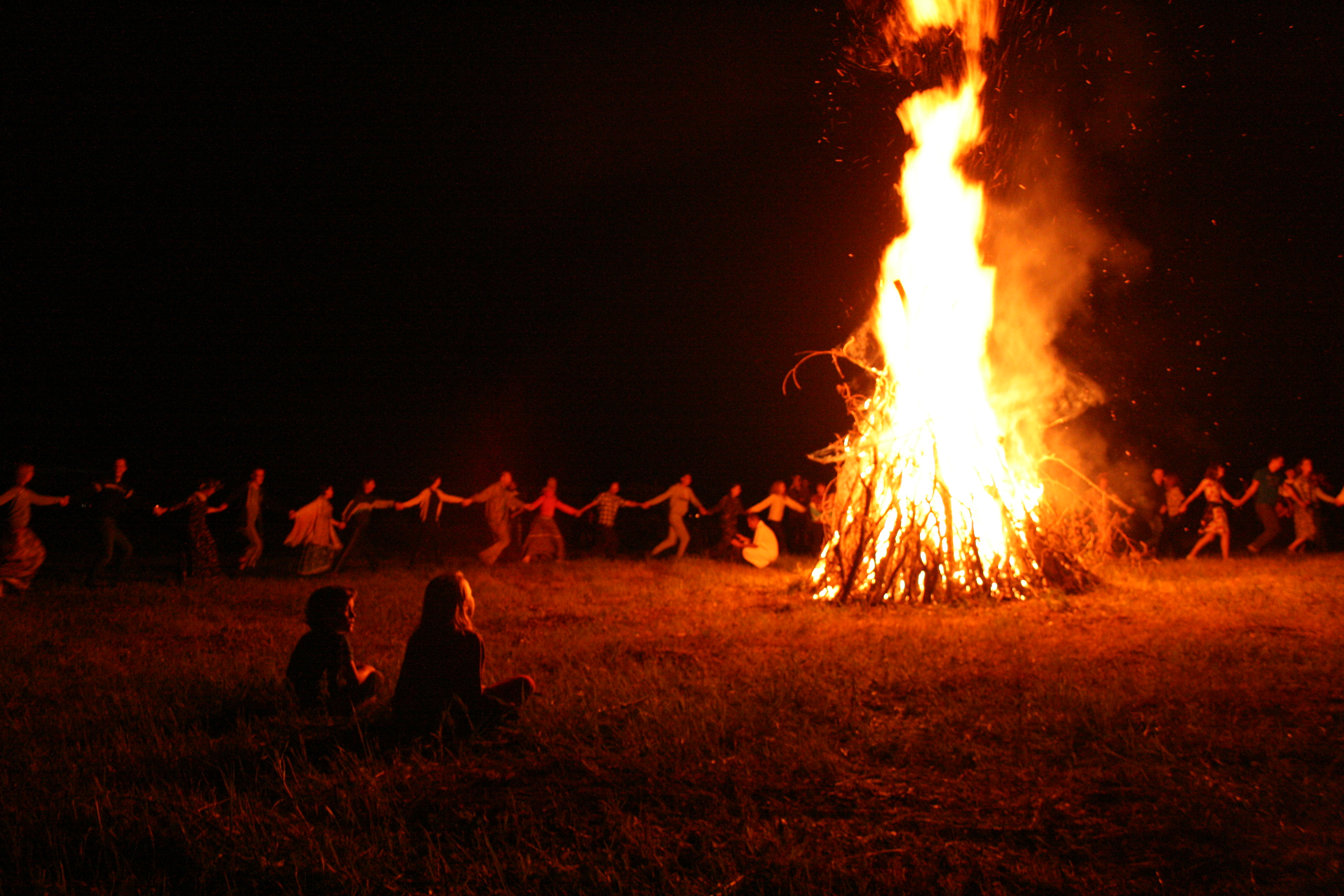 Праздник Ивана Купалы в родовом поселении «Серебряный бор», Белгородская область.